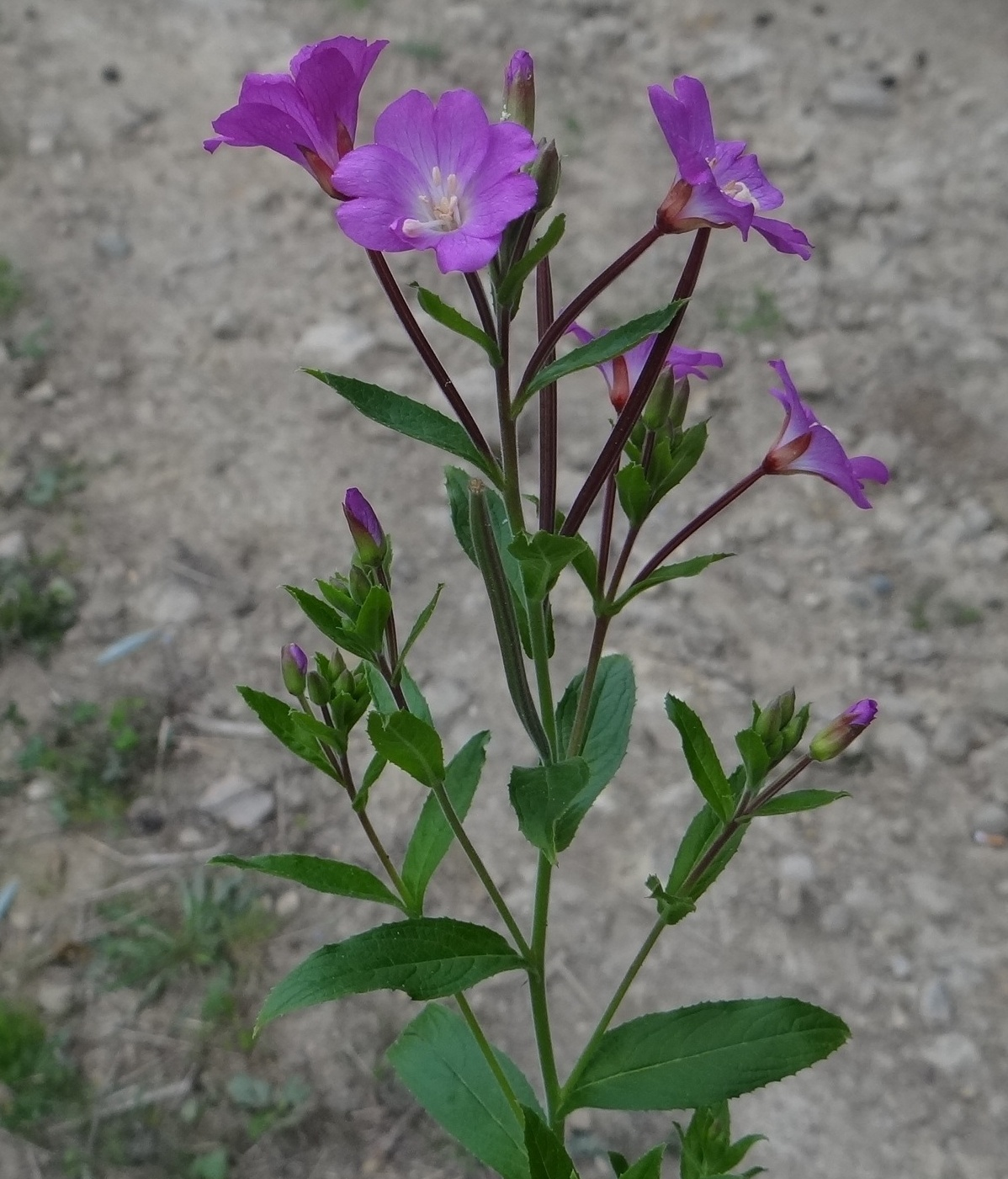 Epilobium hirsutum